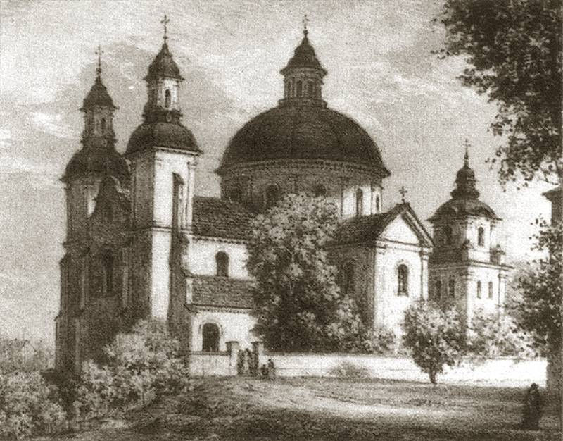 Trzemeszno